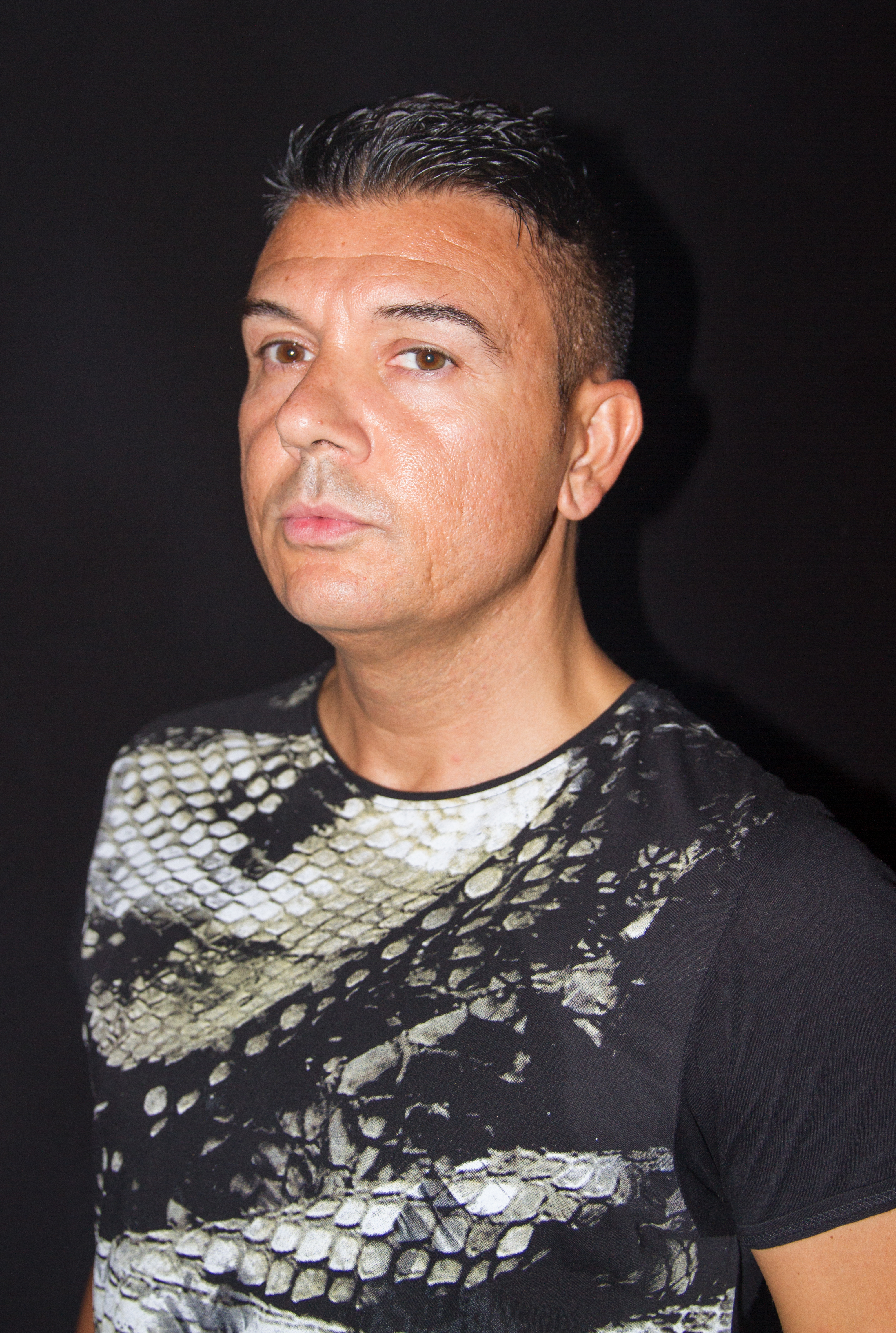 Technoboy beim 14. Airbeat-One Dance Festivals das vom 16. bis 19. Juli 2015 auf dem Flugplatz Neustadt-Glewe stattfand